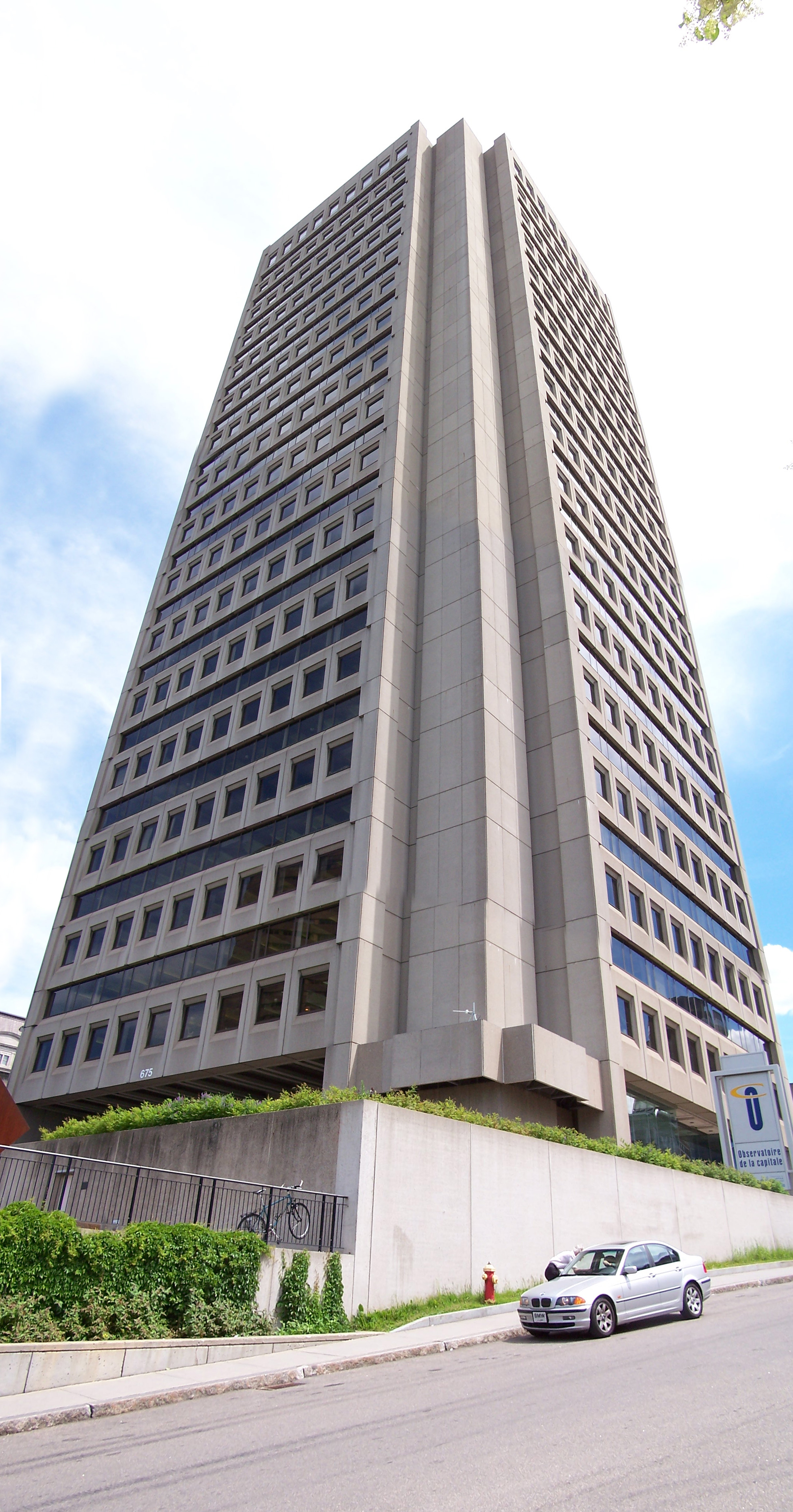 Édifice Marie-Guyart Auteur:Stéphane Voyer